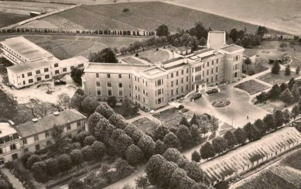 Centre du Cancer de Rennes. Photo aérienne vers 1935. Carte postale ancienne (Coll. Person.).